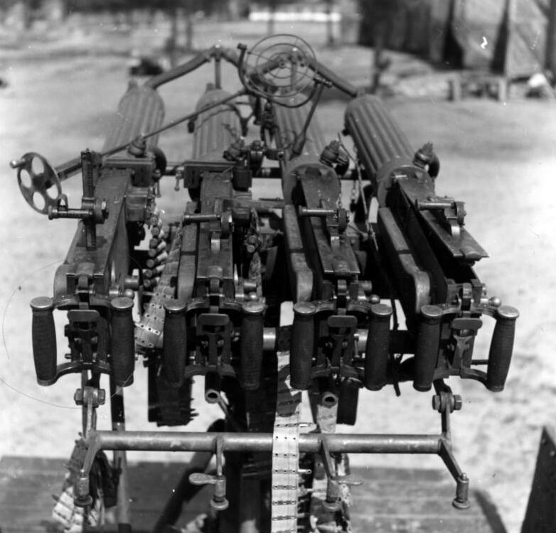 Russ. Vierlings MG.